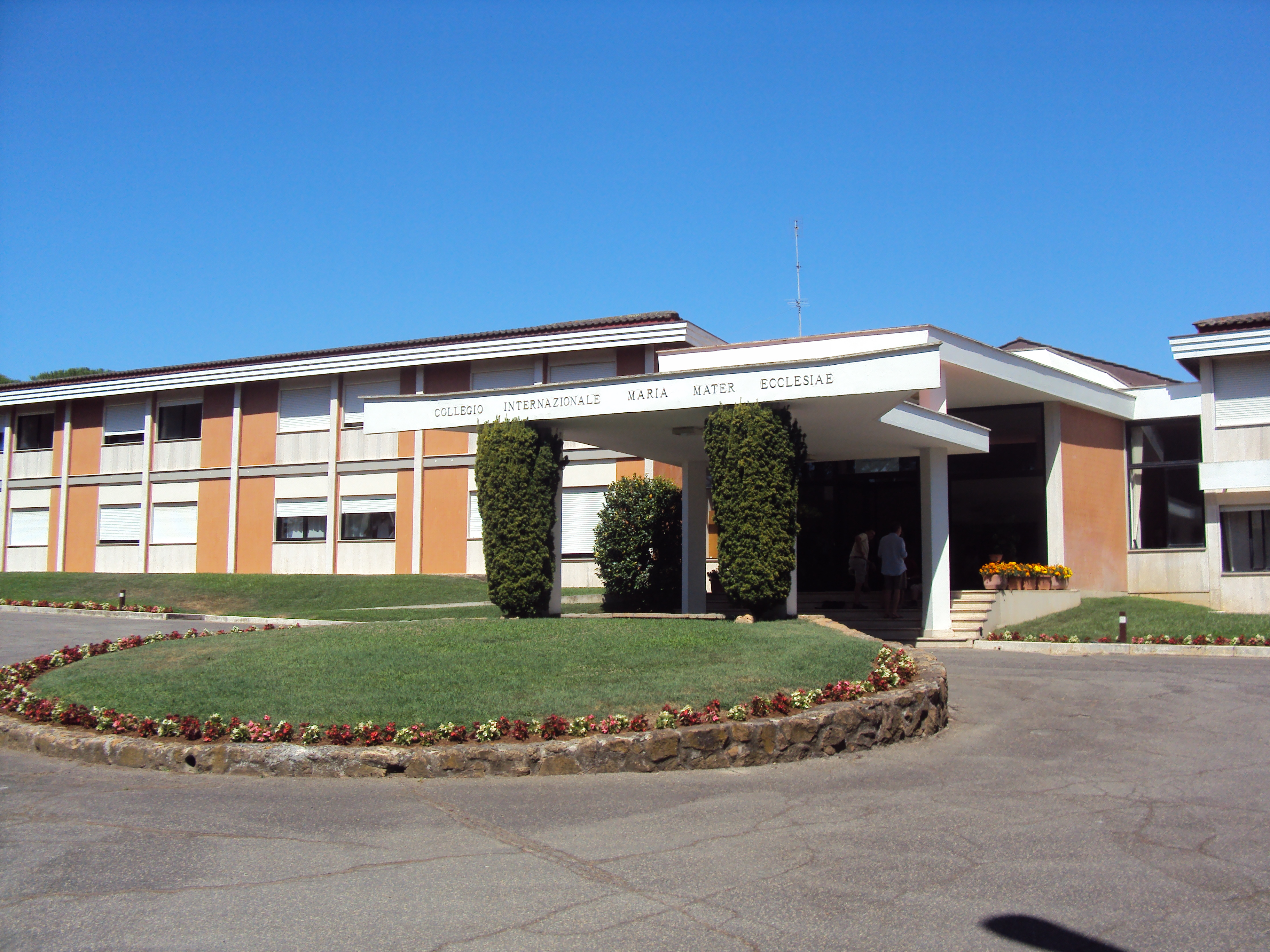 Sede dell'Academia Vivarium Novum, a Roma, sulla via Aurelia, in via Corrado Barbagallo, nel Collegio internazionale Maria Mater Ecclesiae